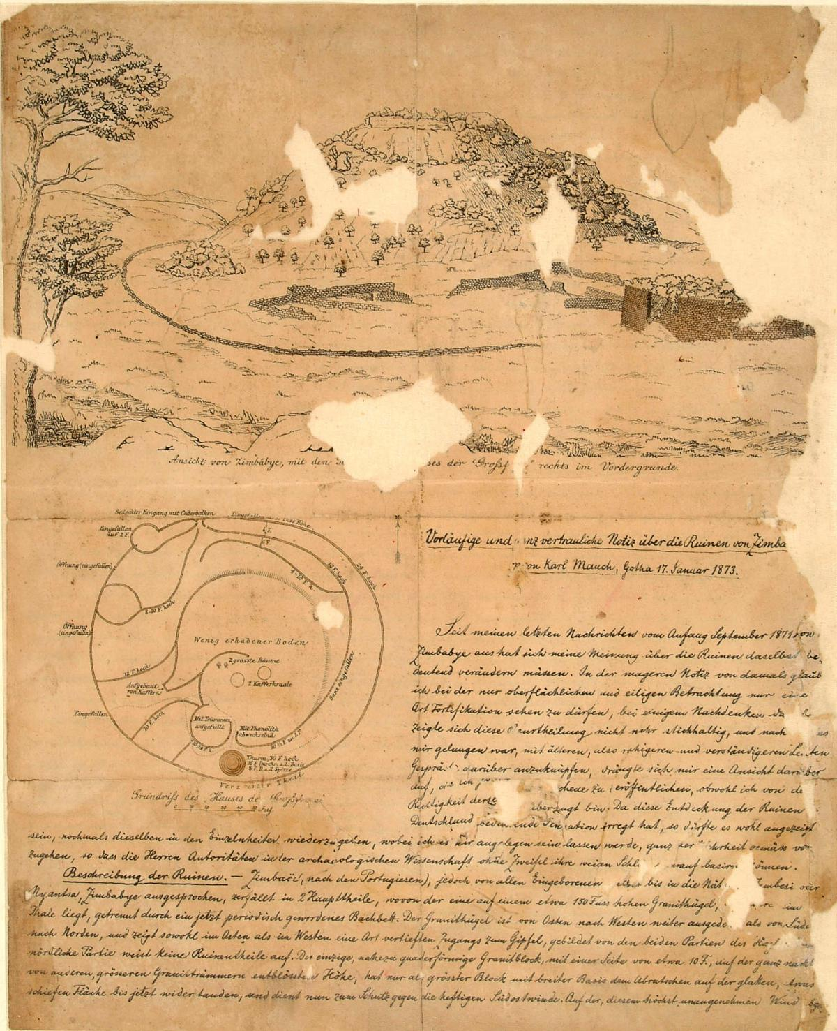 Q 2/12 Bü 24 Bild 1 Notizen und Skizzen Karl Mauchs von seinen Reisen sowie solche meteorologischer, geognostischer und kartographischer Art, die ihm als Grundlagen für seine späteren Tagebücher dienten / 1870-1872